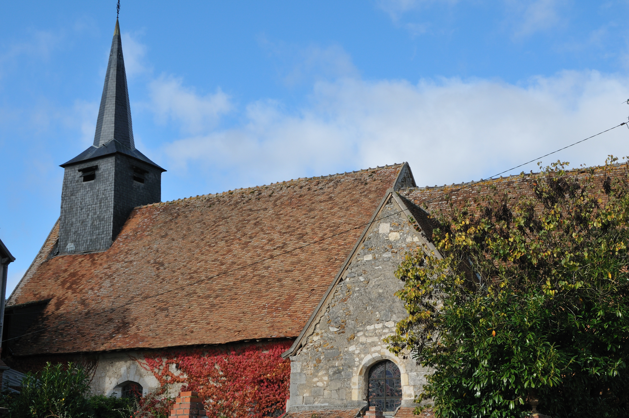 Église Saint-Firmin (vue par dessus les toits des maisons voisines), Saint-Firmin-sur-Loire, Loiret, France